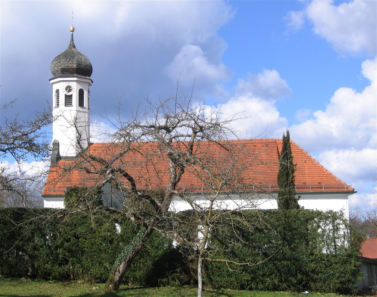 Kirche St. Anian, Irschenhausen, Icking